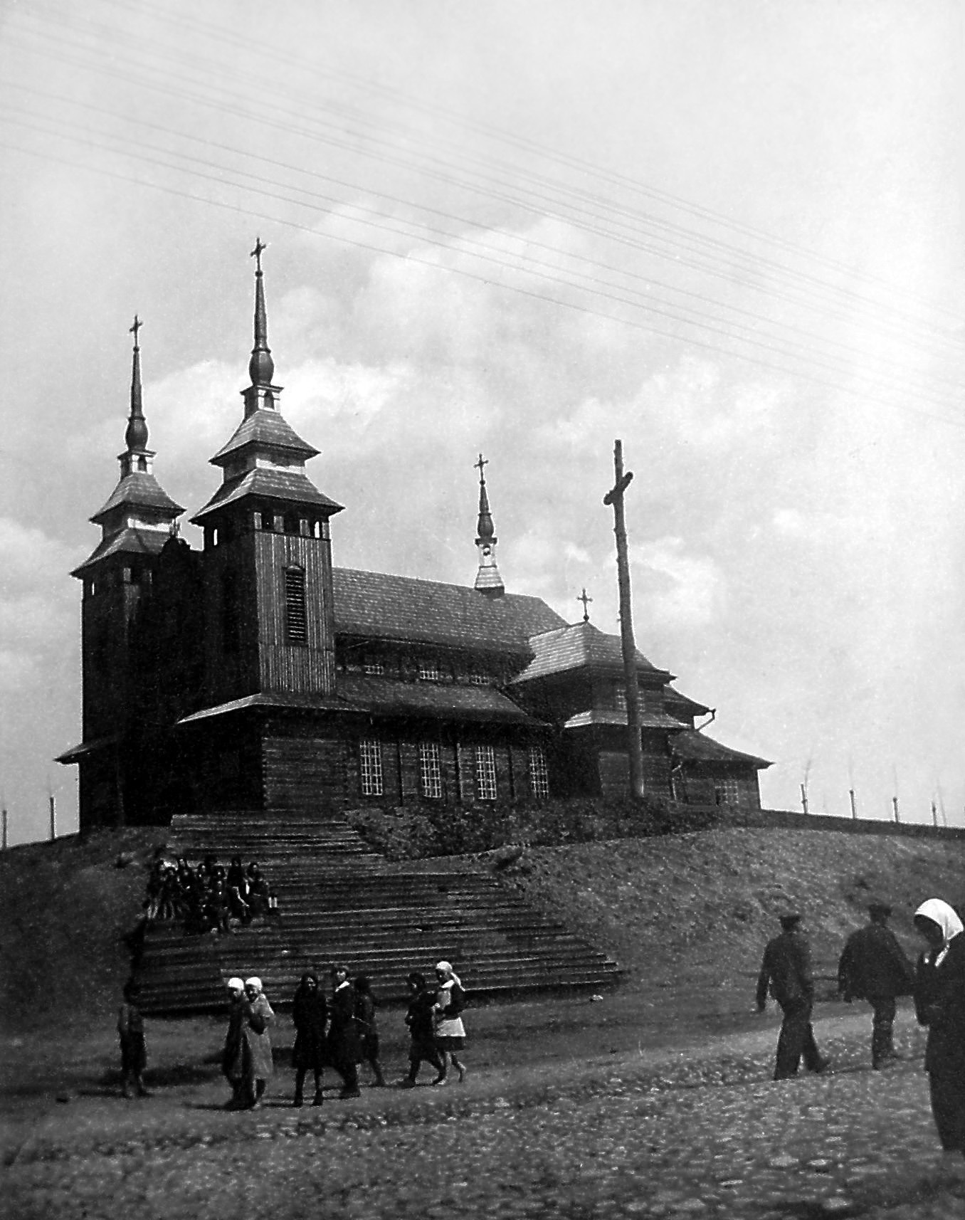 Беларуская (тарашкевіца): Крэва (Kreva), рог пляцу Рынак (plac Rynak) і вуліцы Смаргонскай (vulica Smarhonskaja). Касьцёл